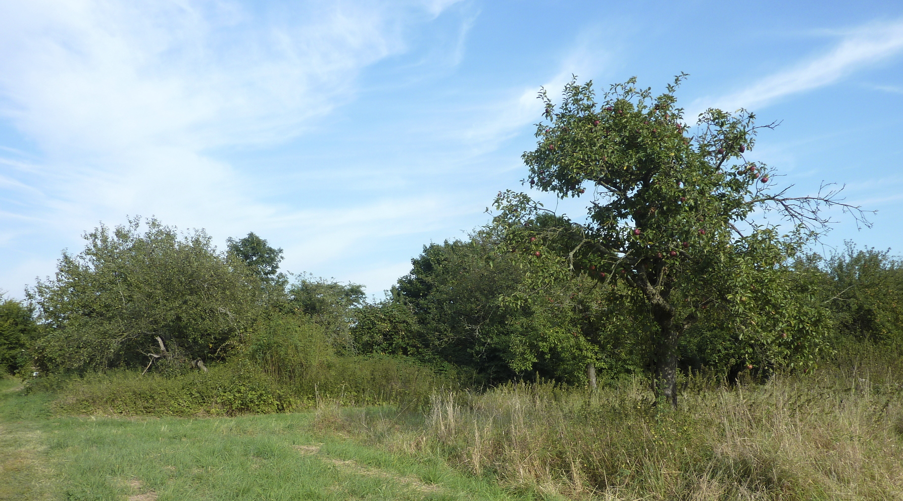 Frankfurt am Main, Stadtteil Sossenheim: Sossenheimer Unterfeld ist die Sammelbezeichnung für die landwirtschaftlich genutzten Felder und Wiesen zwischen dem südlichen Ortsrand Sossenheims und dem rechten Ufer des Flusses Nidda. Das Foto zeigt Apfelbäume am Rande einer der für das Unterfeld charakteristischen Streuobstwiesen